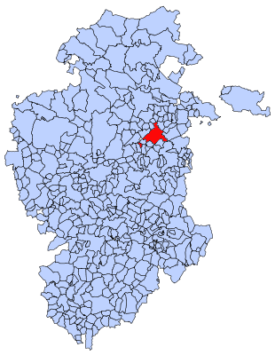 Briviesca en el mapa Municipal de Burgos.